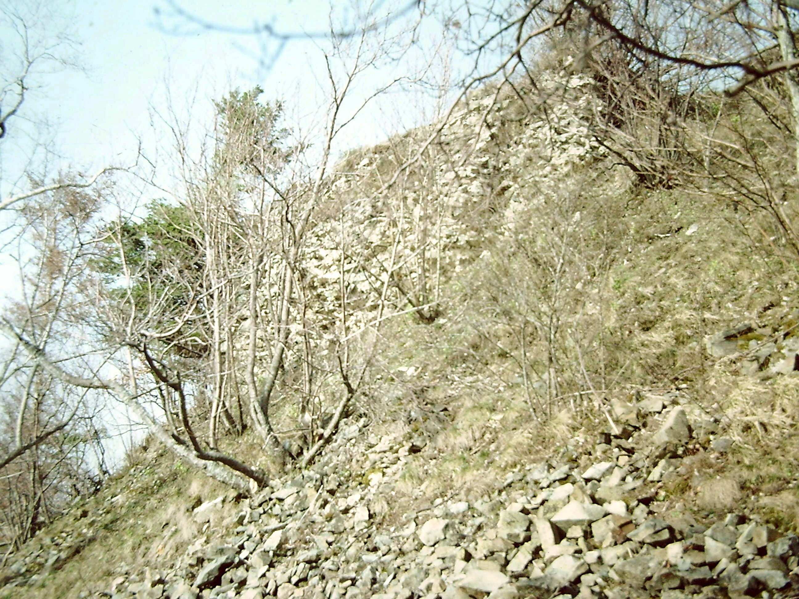 Château du Hohrupf